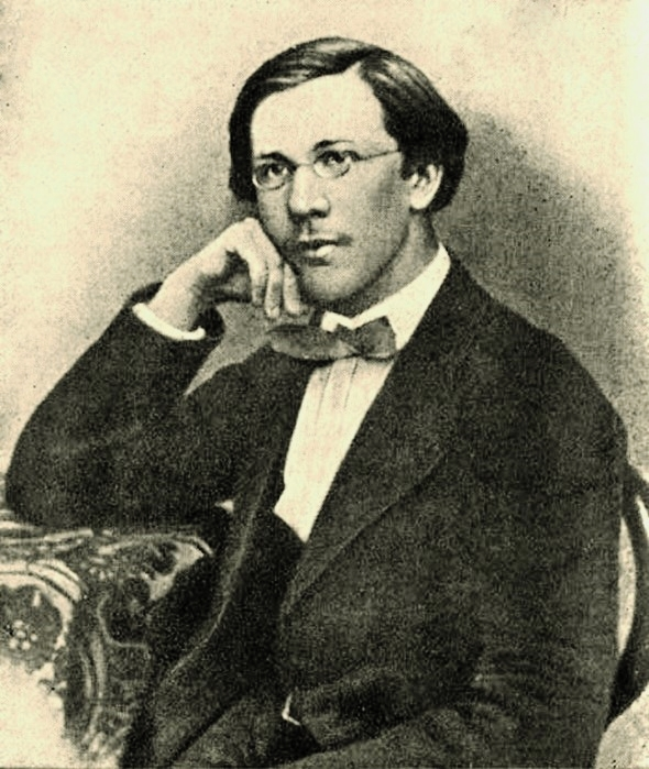 Nikolaj_Aleksandrovic_Dobroljubov